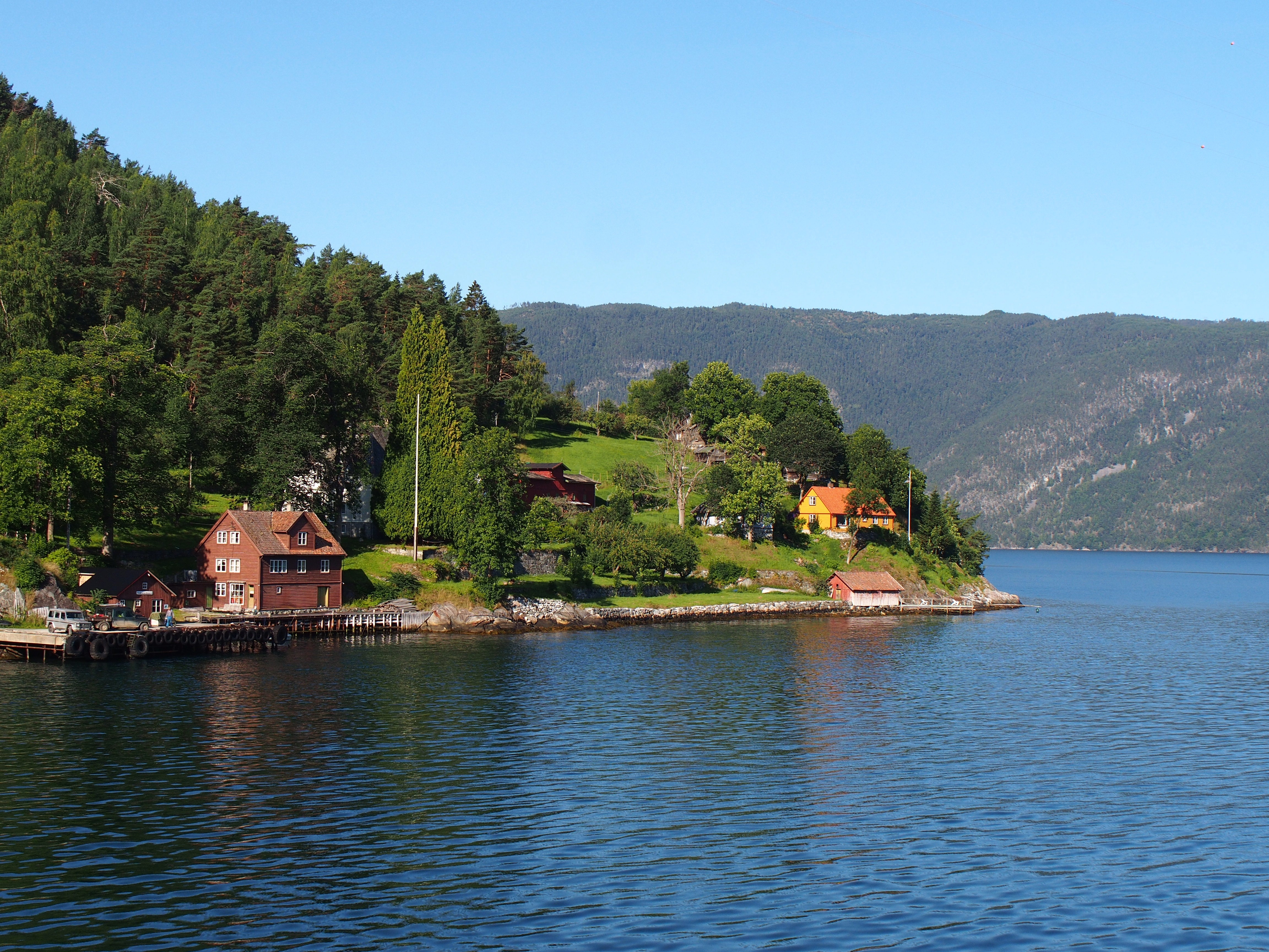 Village of Frønningen - 2013.08